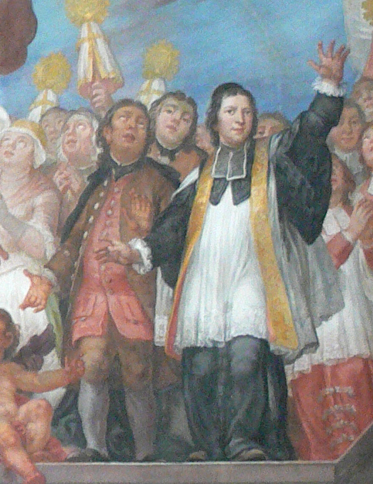 Bad Wurzach, Pfarrkirche St. Verena, Deckenfresko im Mittelschiff von Andreas Brugger Ostteil, links Kapitelsbote Graf, rechts von ihm mit erhobenem Arm Dekan Johann Nepomuk von Kolb, Pfarrer in Wurzach 1756–1799, dahinter zwischen den beiden Schulmeister Josef Caspar (1747–1825)